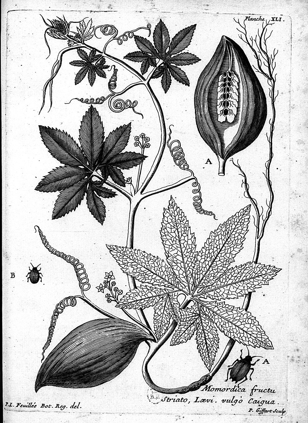 "Momordica fructu striato". In: "Journal des Observations Physiques, Mathematiques et Botaniques, faites par l'ordre du roy sur les côtes orientales de l'Amérique méridionale et dans les Indes occidentals depuis l'année 1707 jusques en 1712." by Louis Feuillee, (1660-1732). Actuellement connu sous le nom de Cyclanthera pedata